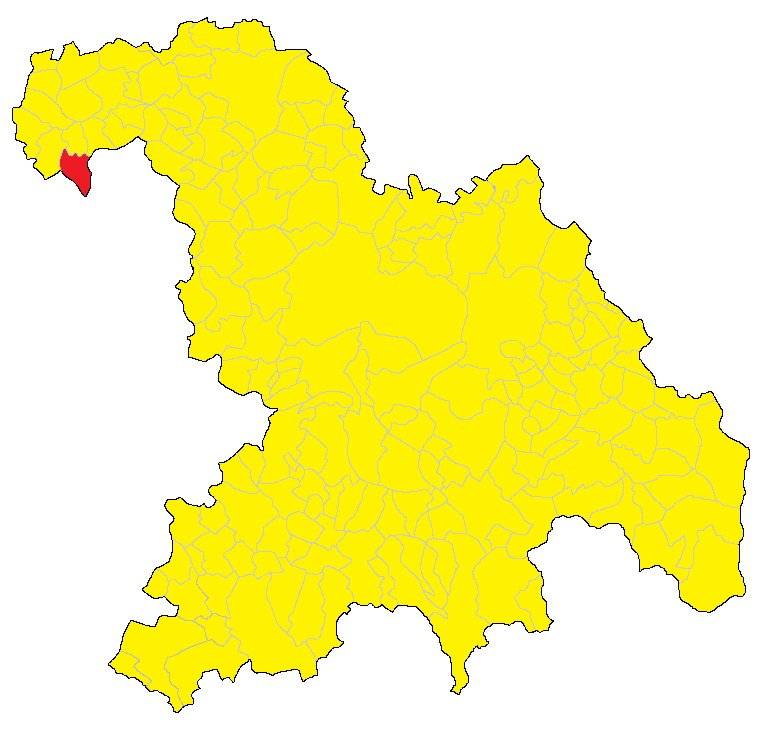 Mappa del comune di Alfiano Natta (AL).